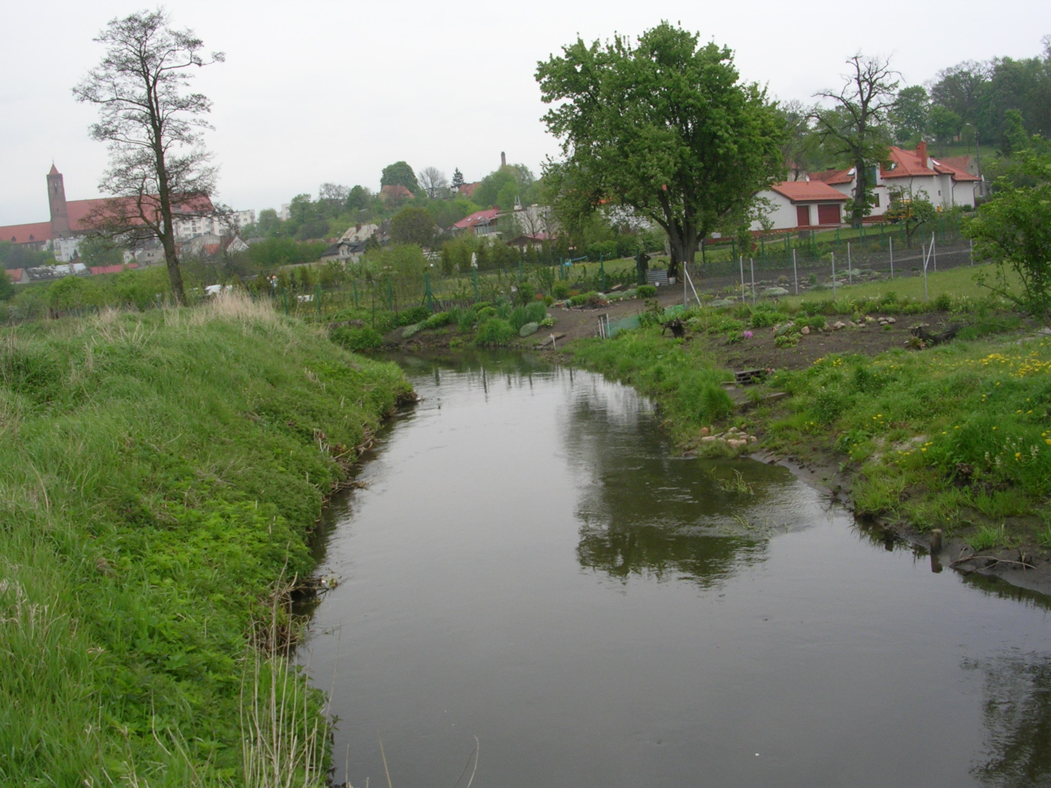 Liwa niedaleko Kwidzyna, Poland